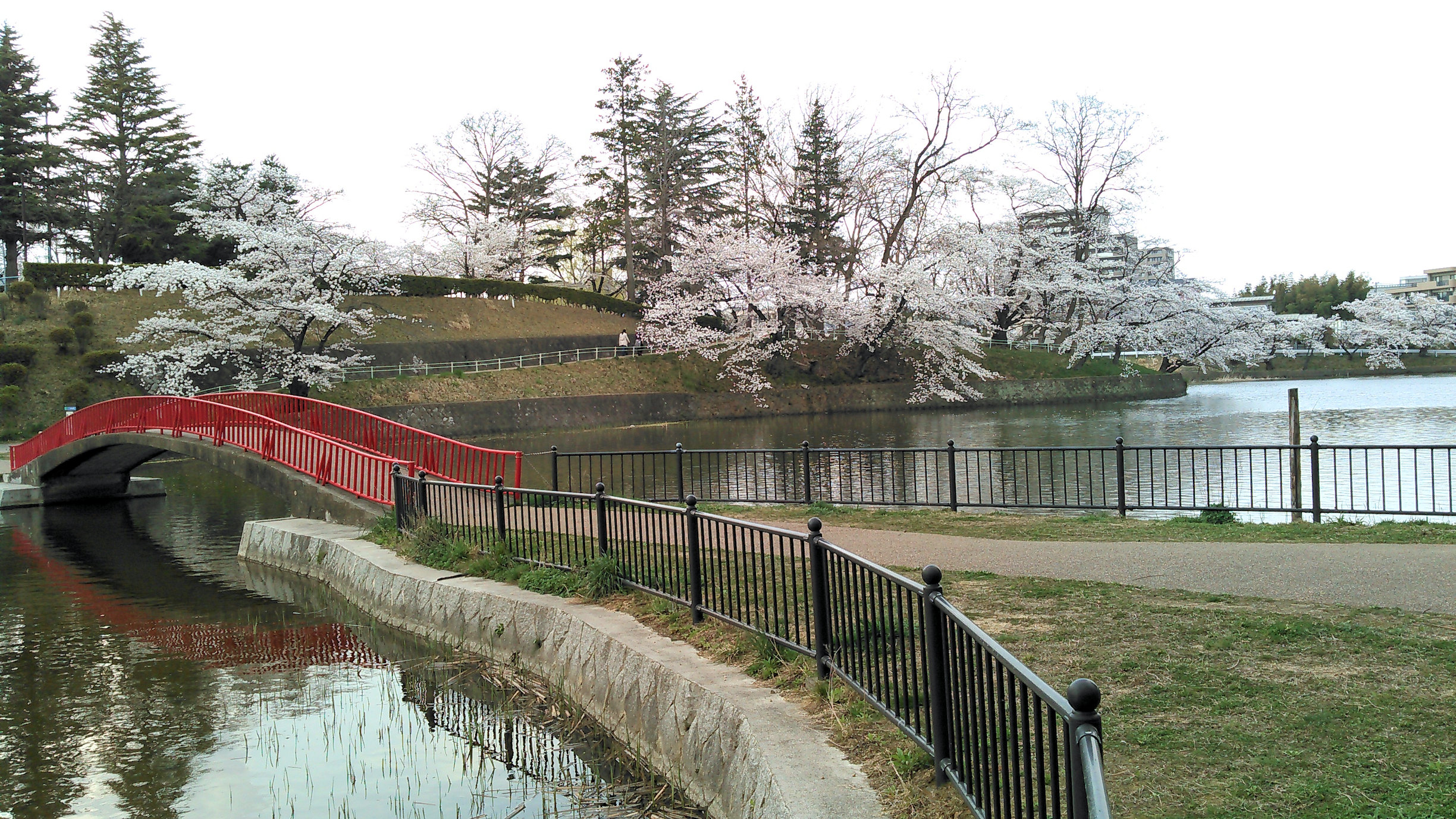 郡山市酒蓋公園の橋と桜